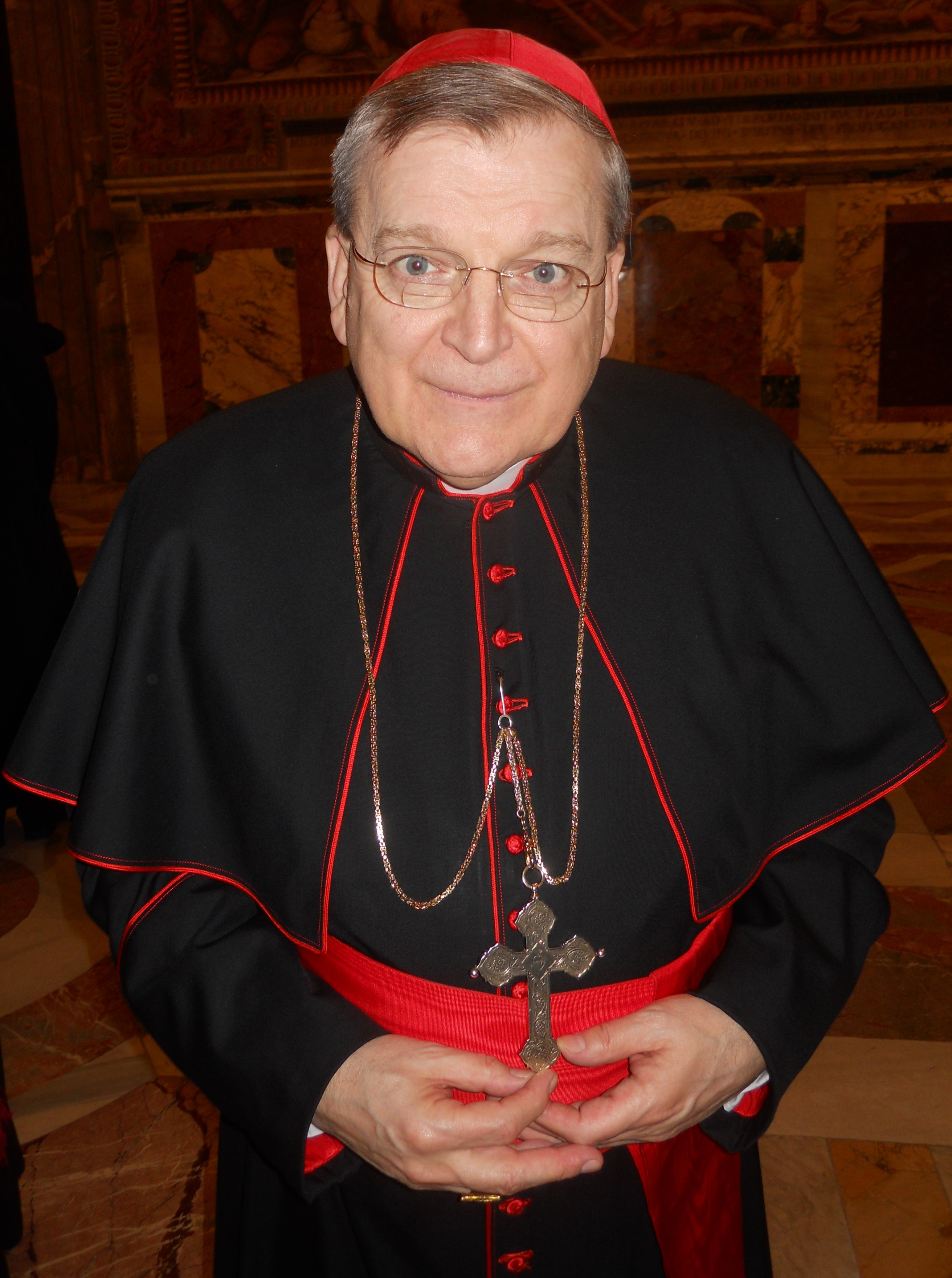 Raymond Leo Cardinal Burke